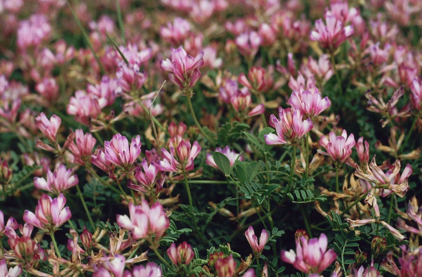 Hedysarum spinosissimum subsp. capitatum, Hülsenfrüchtler (Fabaceae), Schmetterlingsblütler (Faboideae) – Griechenland/Ελλάδα/Greece: zwischen Svoronáta/Σβορωνάτα und Akra Ag. Pelagia, SSE Miniá/Μηνιά (Kefallinia/Κεφαλληνία)